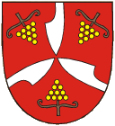 Znak obce Slatinky